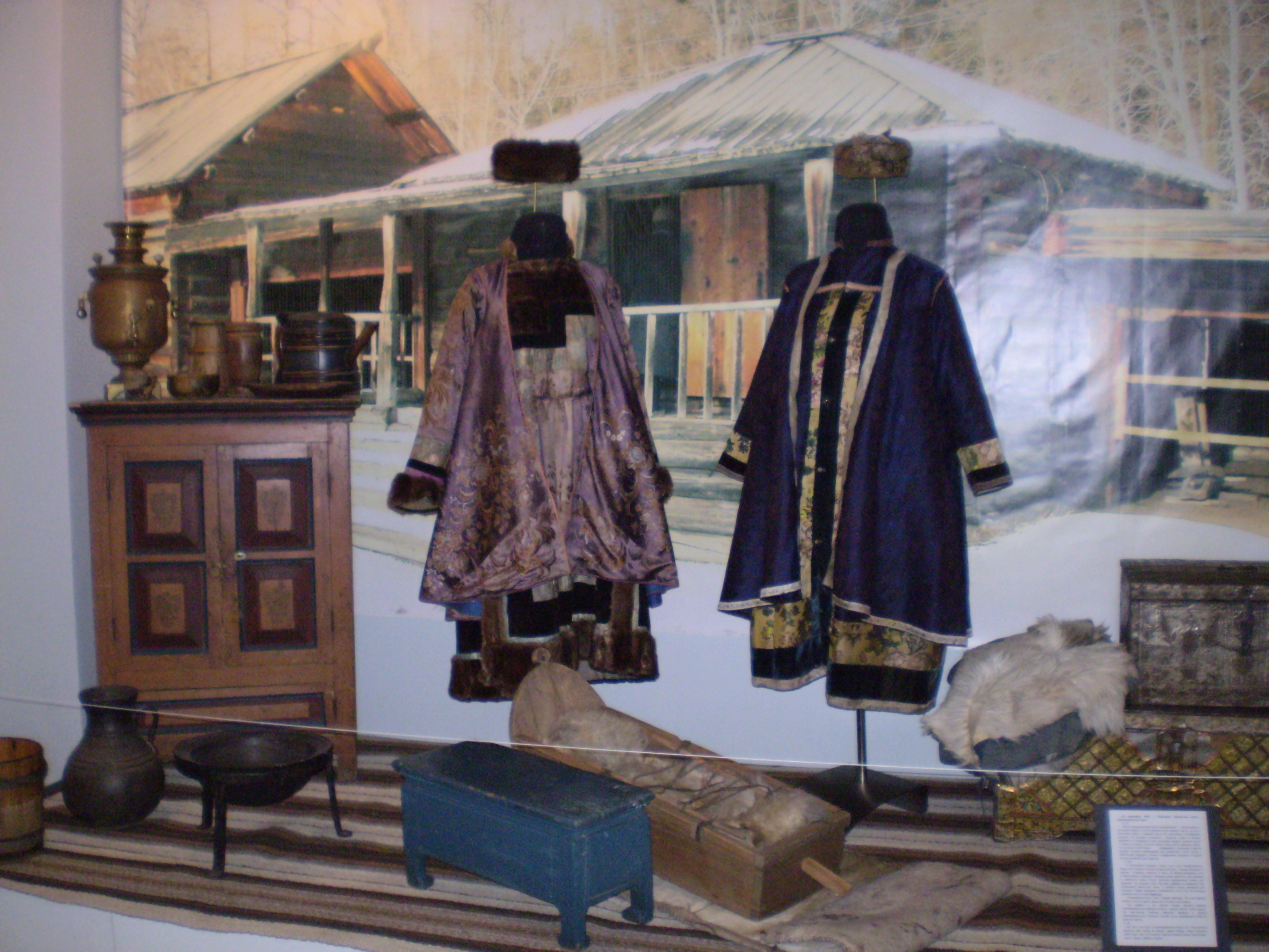 Музей истории Бурятии. Фрагмент экспозиции.